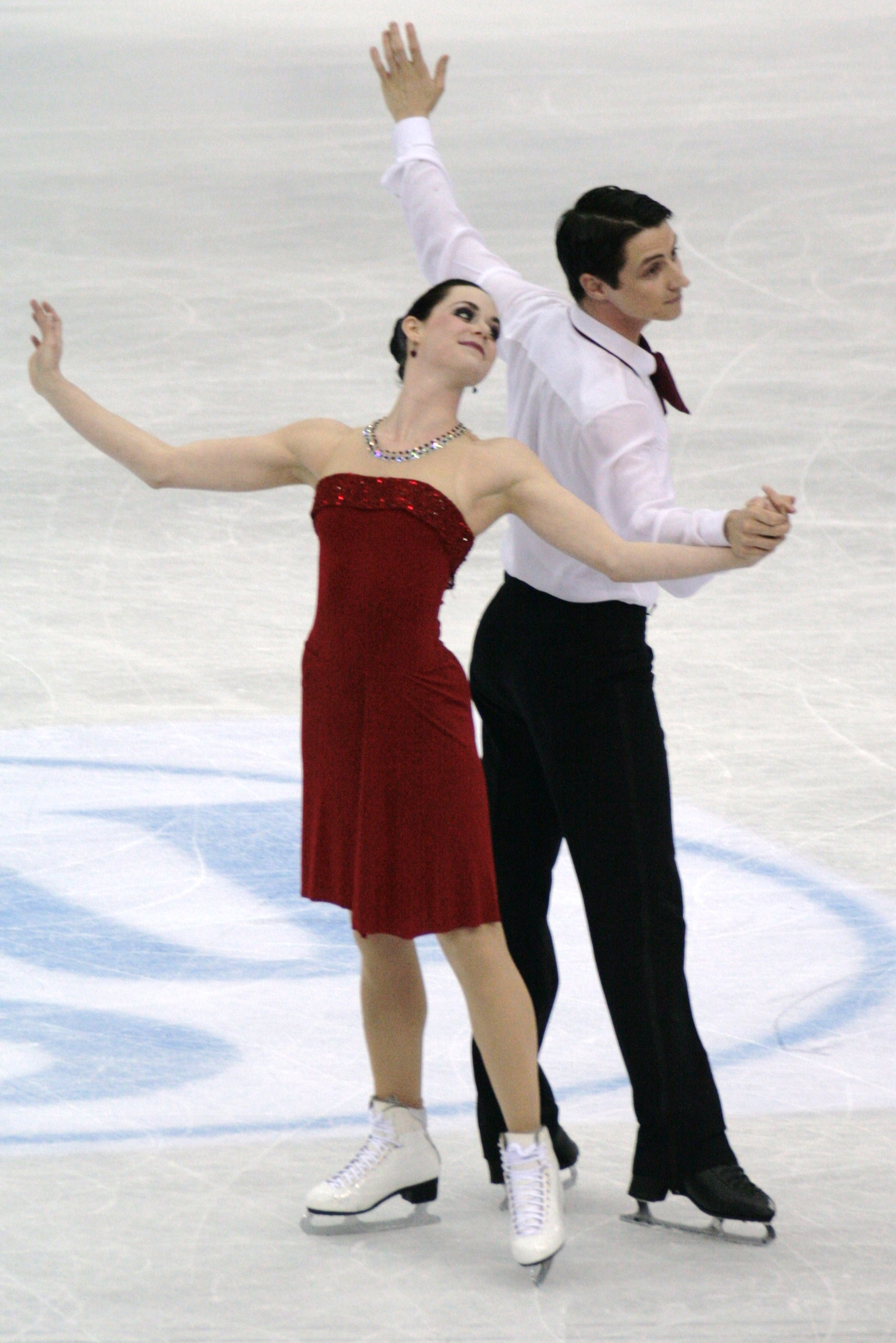 Тесса Вертью и Скотт Моир (Канада) на чемпионате мира по фигурному катанию 2012